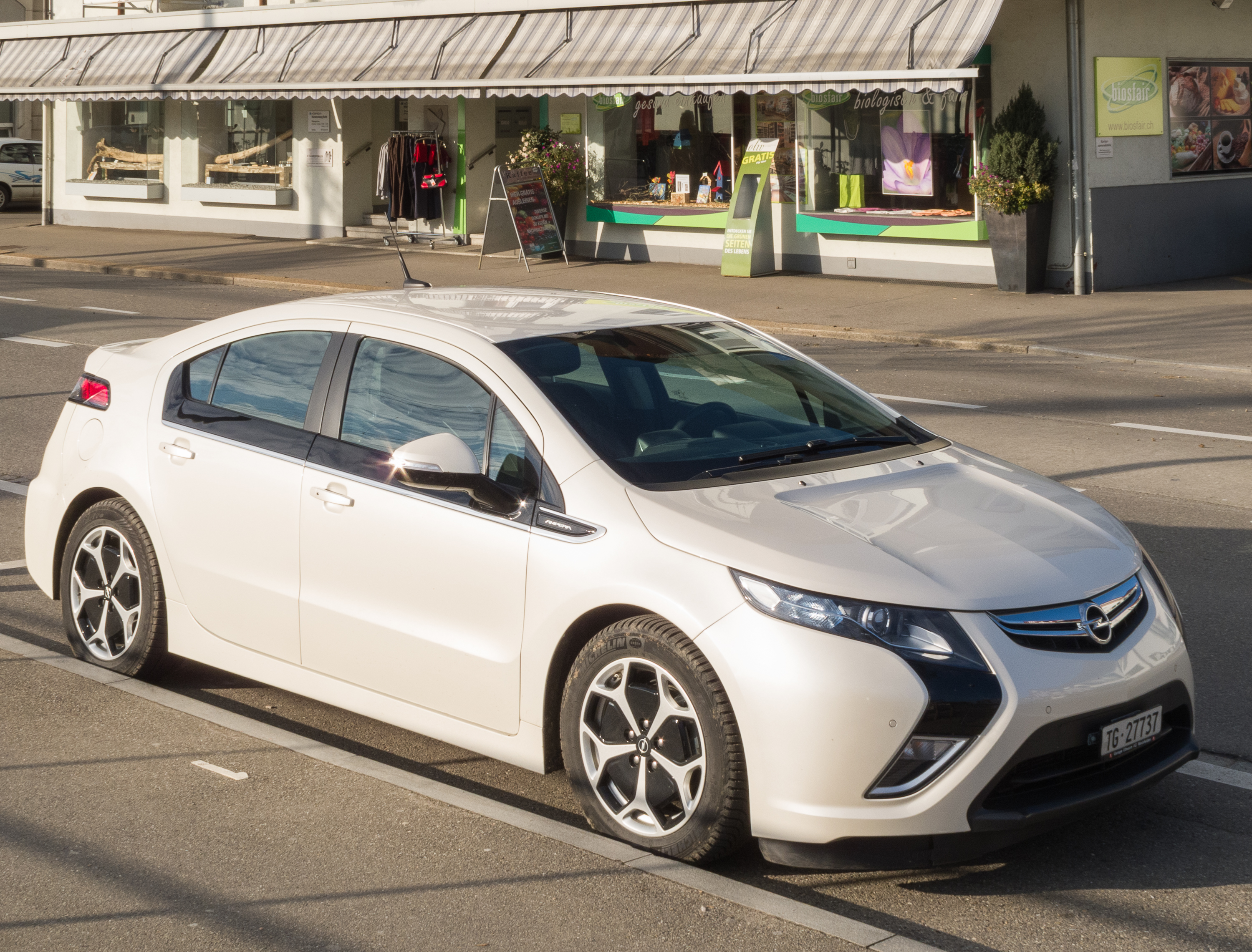 Opel Ampera in Weinfelden